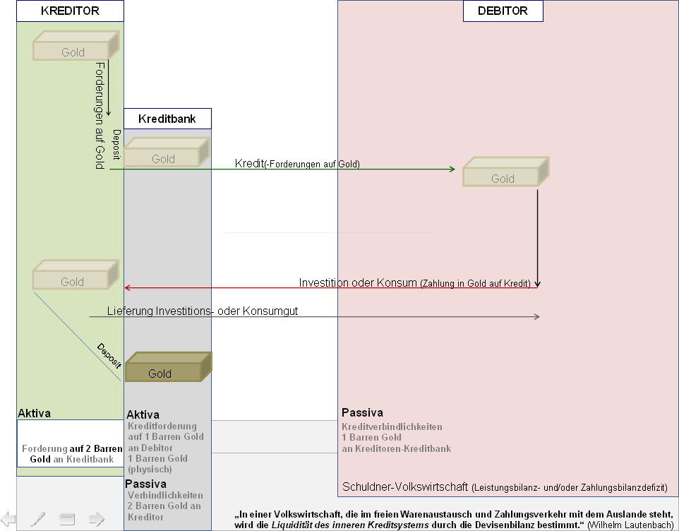 Vergibt ein Kreditor Goldkredit an einen Debitor und verwendet dieser die Gutschrift zu Investition oder Konsum bei einem Kreditor und ist Letzterer Kunde bei der selben Kreditbank, hat sich clearingtechnisch das Gold am Ende des Tages nicht bewegt, nur die Bilanzen haben sich verändert. Die Bilanz der Kreditbank hat sich verlängert, die Quote ihrer Solvabilität hat sich nicht verändert, weshalb sie weiterhin Kredit gewähren kann (das trifft vor allem für Banken aus Leistungsbilanzüberschuss-Staaten zu, aber auch in Zahlungsbilanzüberschuss-Staaten [bei negativer Leistungsbilanz] gilt das mitunter, etwa wenn deutsche Überschüsse bei amerikanischen Banken nach Fondsveranlagungen suchen). Das Vermögen des Kreditors beläuft sich nach der abgebildeten Runde auf die Forderung auf zwei physische Goldbarren an die Kreditbank. Die Kreditbank (abgesehen von offenen Zinsforderungen) hat Verbindlichkeiten in der Höhe von zwei Baren Gold an den Kreditor (Passiva) und Kreditforderungen an den Debitor in der Höhe eines Goldbarrens sowie einen physischen Goldbaren im Tresor (Aktiva). Der Debitor hat Verbindlichkeiten in der Höhe eines Goldbarrens (Passiva) an die Kreditbank und demgegeüber eventuell (bei Investition) Sachanlagen in gleicher Höhe (Aktiva). Befürchtet die Kreditbank, dass sie den Forderungen des Kreditors (auf zwei Barren Gold) in voller Höhe eventuell nicht nachkommen könnte, kann sie sich bei der Zentralbank refinanzieren (Kreditforderung auf einen Barren verpfänden) oder aber ihre Kreditforderung am Interbankenmarkt verkaufen. Nach dem Liquiditätssaldokonzept (Köhler 1970) bleibt sie aber ohnedies liquide, sofern die Zentralbank ihre Aktivapositionen als refinanzierungsfähig bewertet, sodass sie diese jederzeit gegen Zentralbankgeld eintauschen kann. Aus einem Barren Gold können theoretisch beliebig viele Kredite in unbestimmter Höhe vergeben werden, sofern der eine Barren immer wieder zu Kreditoren der Überschuss-Volkswirtschaft zurückfließt.